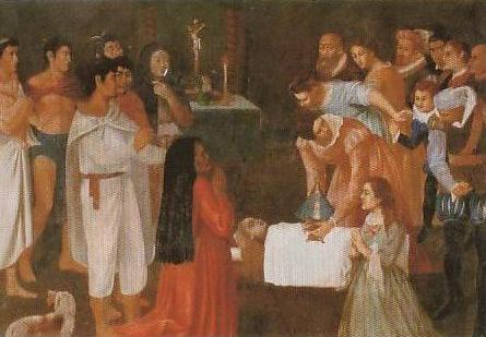 Imagen sobre el 1er Milagro